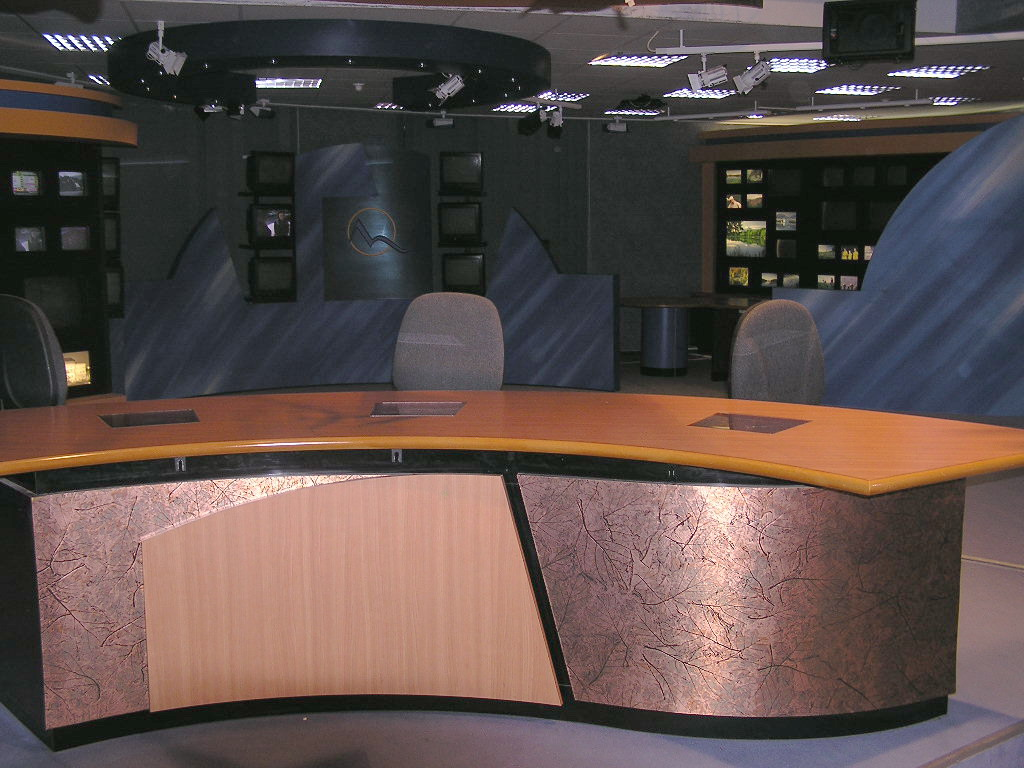 Štúdio Televíznych novín, TV Markíza